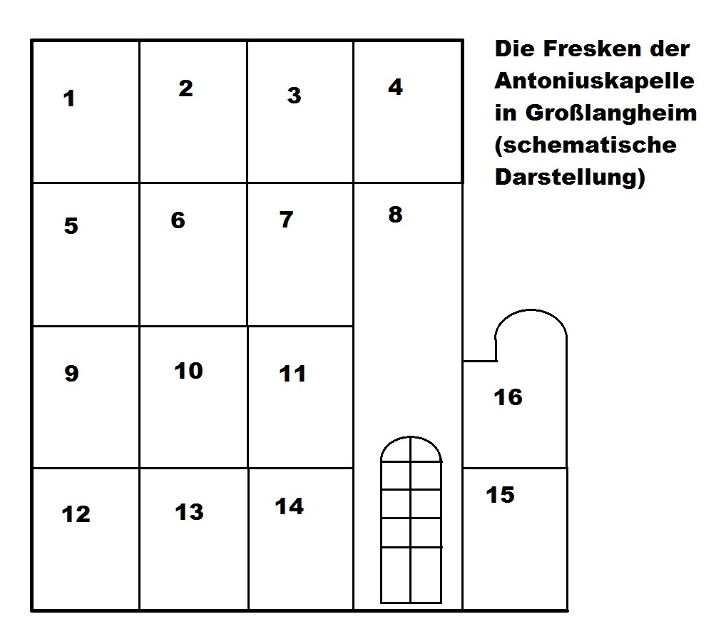 Die Fresken des Antoniuszyklus in der Großlangheimer Antoniuskapelle. (nach Petro Müller: Die Antoniuskapelle in Großlangheim S.27). 1. Begegnung mit einem Einsiedler (umstritten), 2. Antonius im Römerkastell, 3. Der "schwarze Knabe", 4. Wald, Gräberhöhlen, Einsamkeit, 5. Versuchung zum Reichtum, 6. Der Teufel in Gestalt einer Frau, 7. Antonius in Alexandrien, 8. Die Verabschiedung von der Schwester, 9. Die Vision, 10. Antonius schläft wie ein Toter, 11. Antonius segnet die Menschen, 12. Der Teufel in Gestalt eines Riesen, 13. Die Rede an die Mönche, 14. Der Abschied von den Mönchen, 15. Die Grablegung des Antonius, 16. Die Verherrlichung des Antonius.